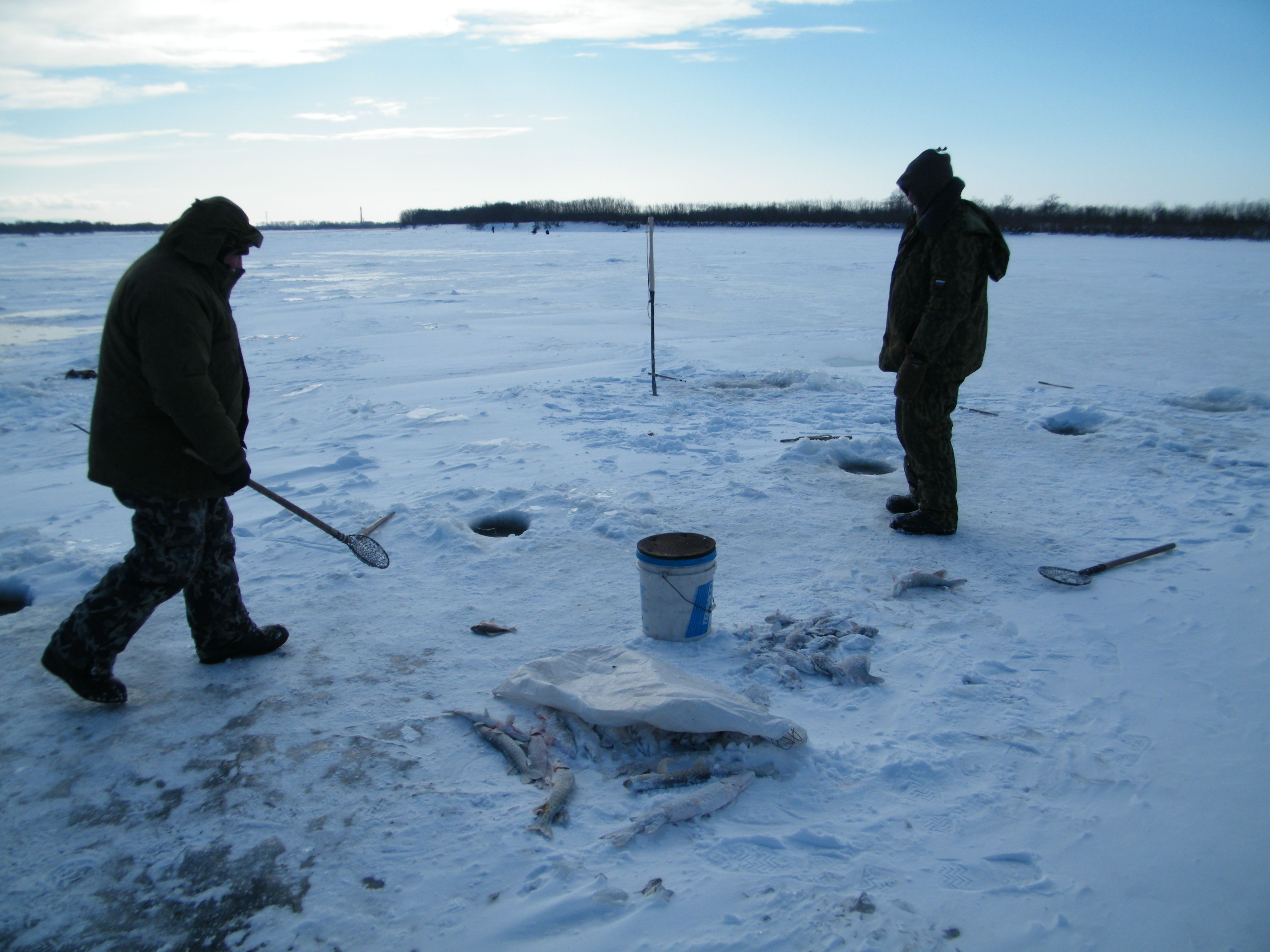 Ловля амурской щуки и карася на реке Тунгуска ЕАО